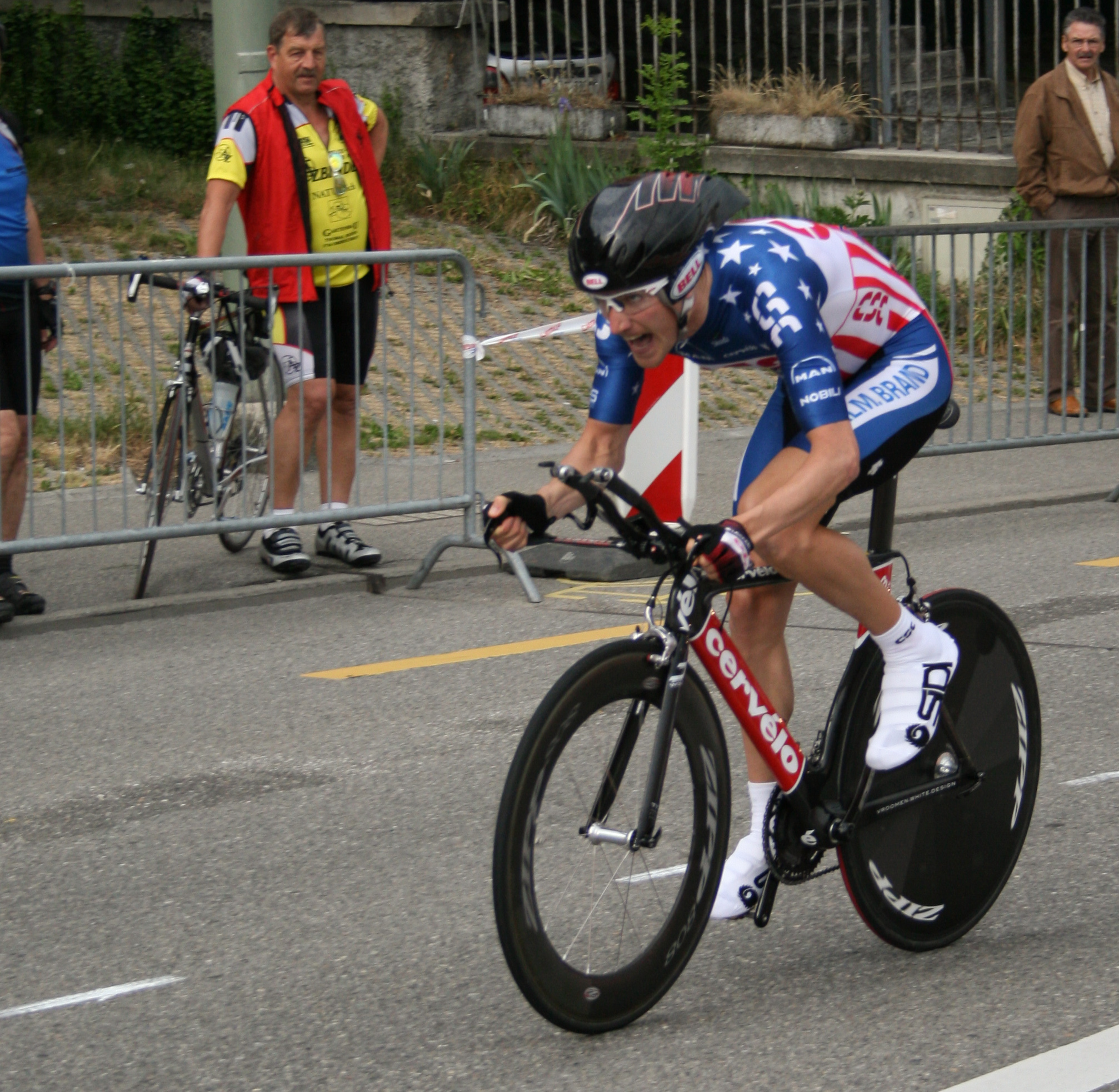 David_Zabriskie prologue du Tour de Romandie 2007